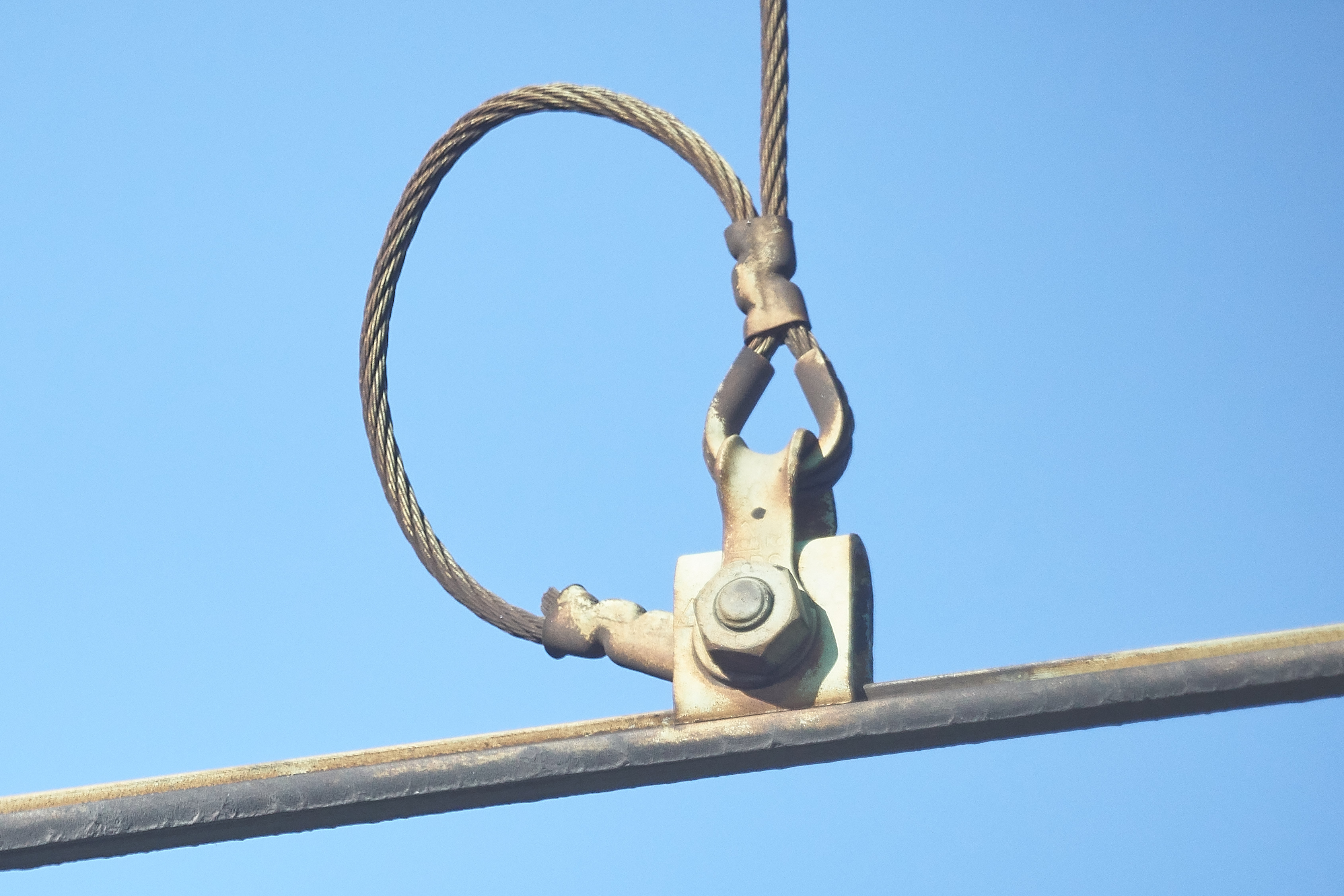 Das Bild zeigt einen Rillenfahrdraht in seiner Aufhängung.